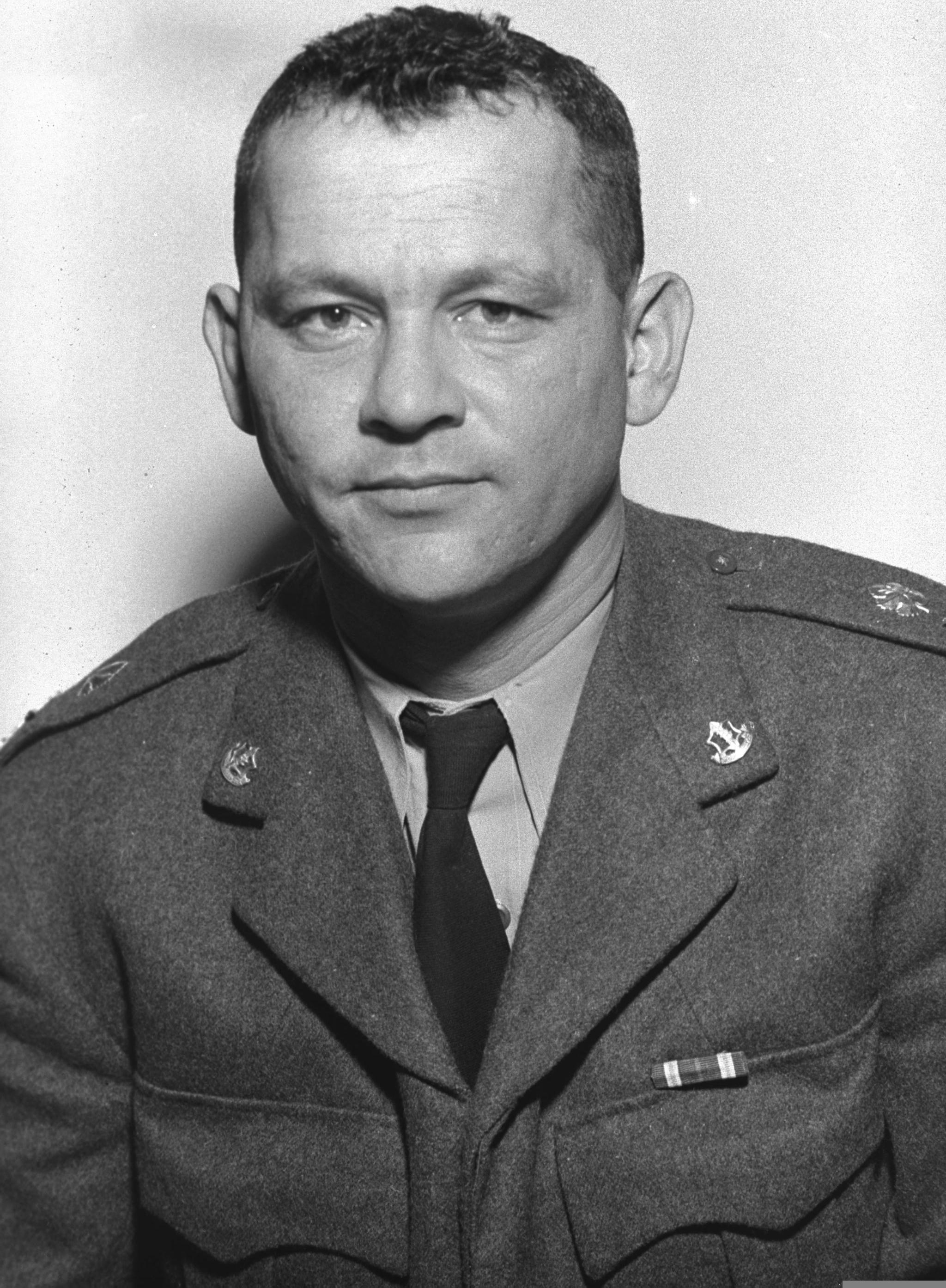 Haim Laskov